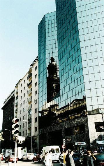 Imagen de la calle Catedral a un lado de la Plaza de Armas de Santiago de Chile; fotografía de Der schöne Tod Versión mejorada por Antoine Categoría:América del Sur (imagen)